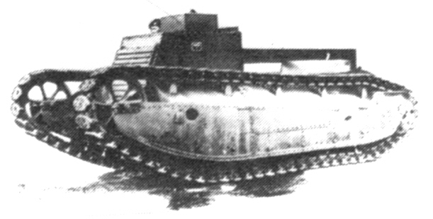 Digitale reproductie foto van het Tropical Tank prototype